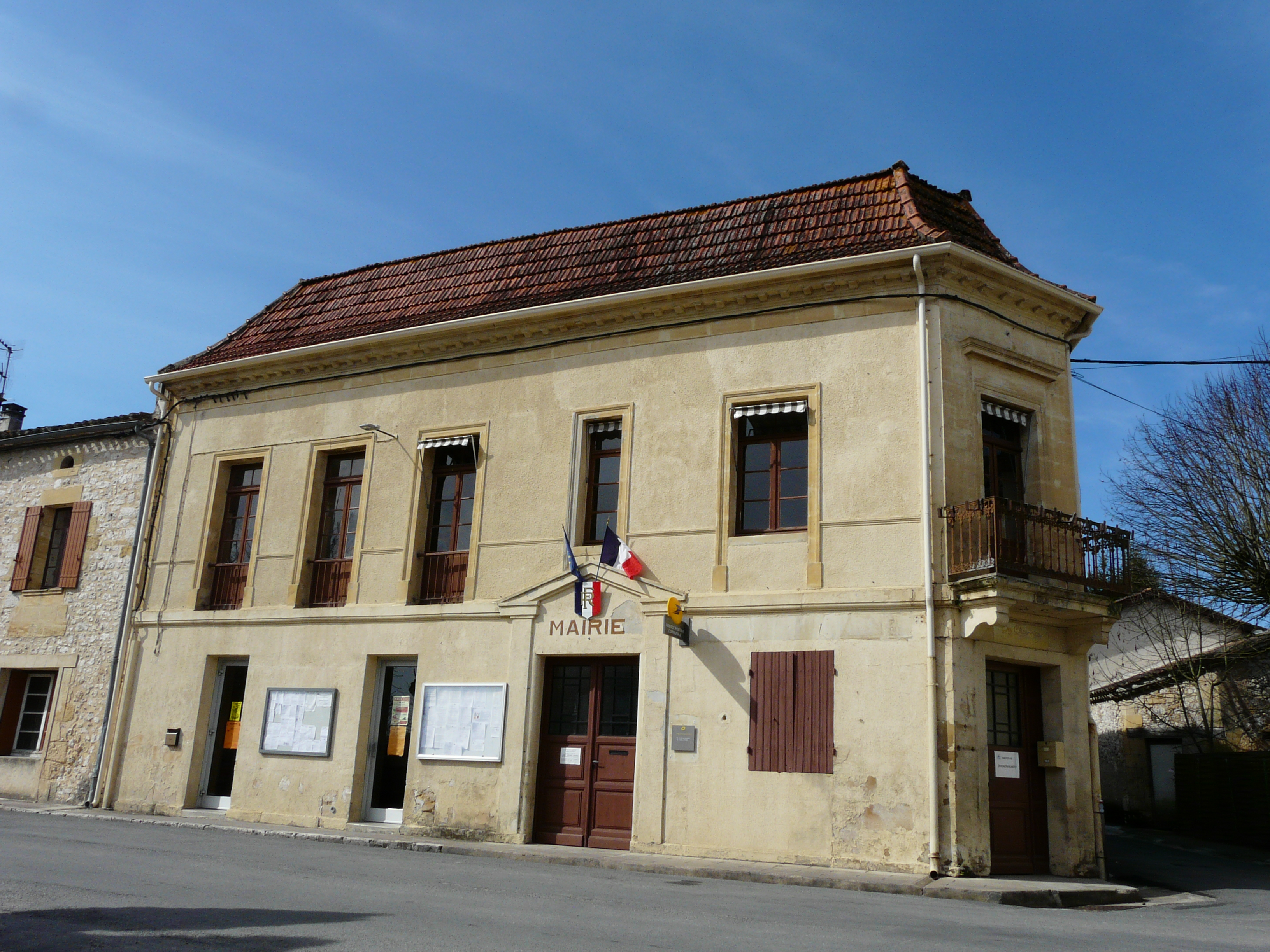 La mairie de Faux, Dordogne, France.